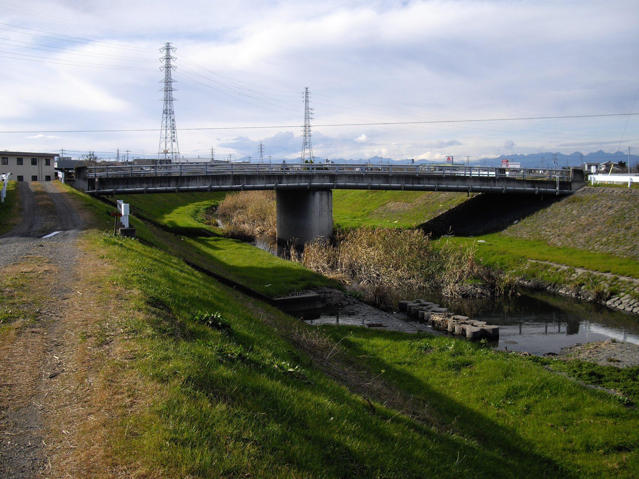 埼玉県北西部を流れる元小山川（利根川水系・一級河川）の写真。撮影地点は新泉橋（本庄市傍示堂地先）。